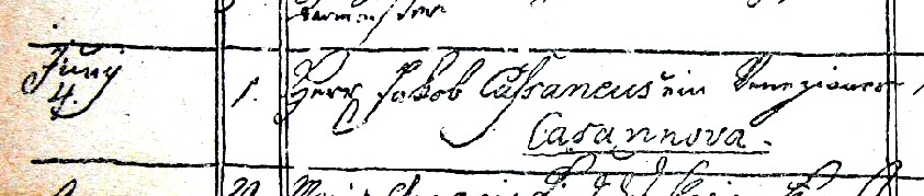 Annotazione nel registro dei decessi di Dux (Boemia) che registra la morte di Giacomo Casanova avvenuta il 4 giugno 1798.